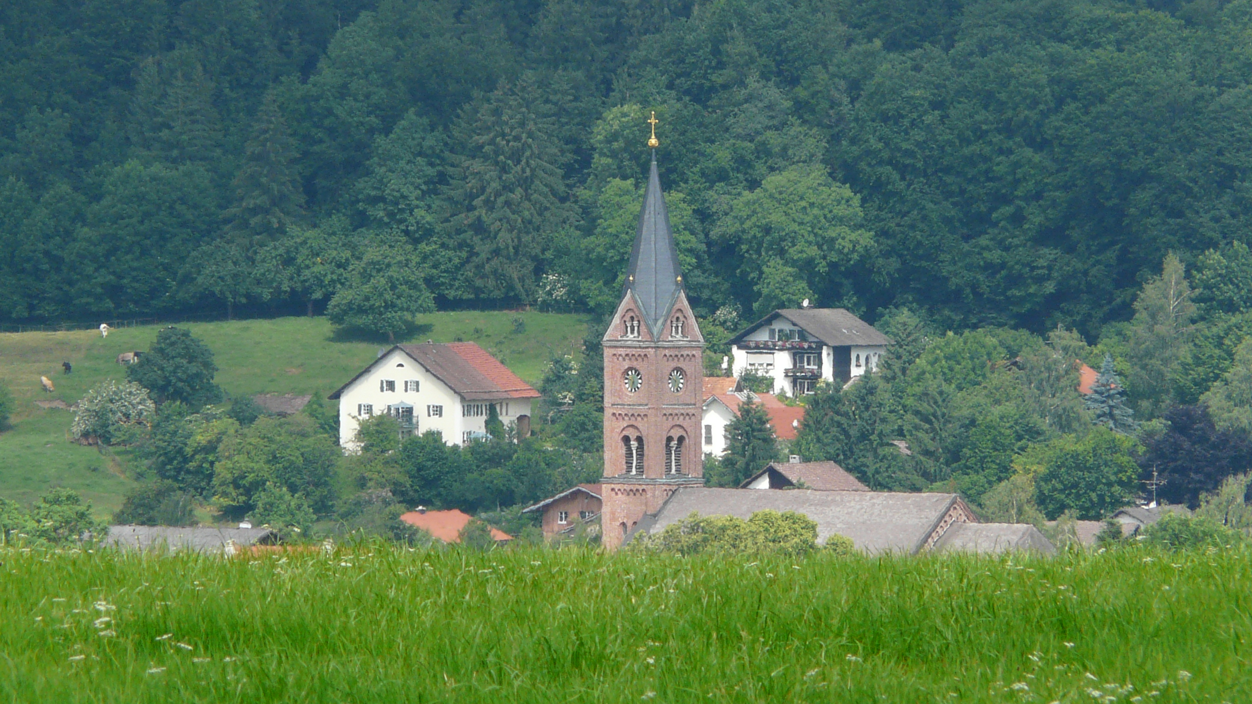 Baisweil, Ostallgäu